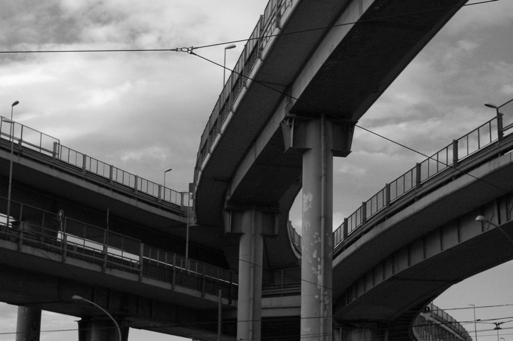 ...questo invece è quello che vedo a roma